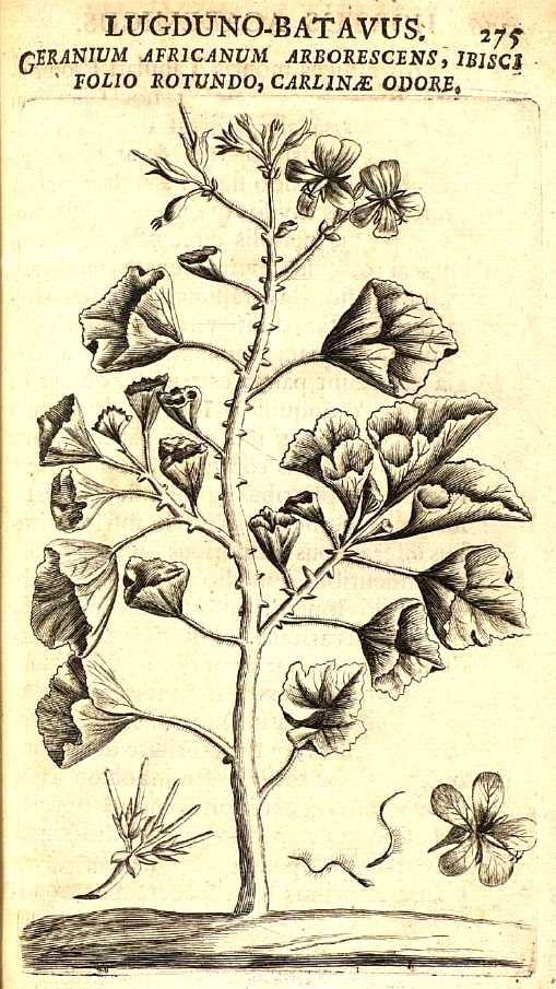 Première illustration de Geranim Africanum par Paul Hermann, dans Horti academici Lugduno-Batavi. L'espèce sera nommée plus tard Pelargonium cucullatum.